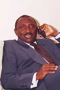 Sidya Touré, Président de l'UFR (Union des Forces Républicaines) et Candidat aux élections présidentielles de République de Guinée le 31 Janvier 2010